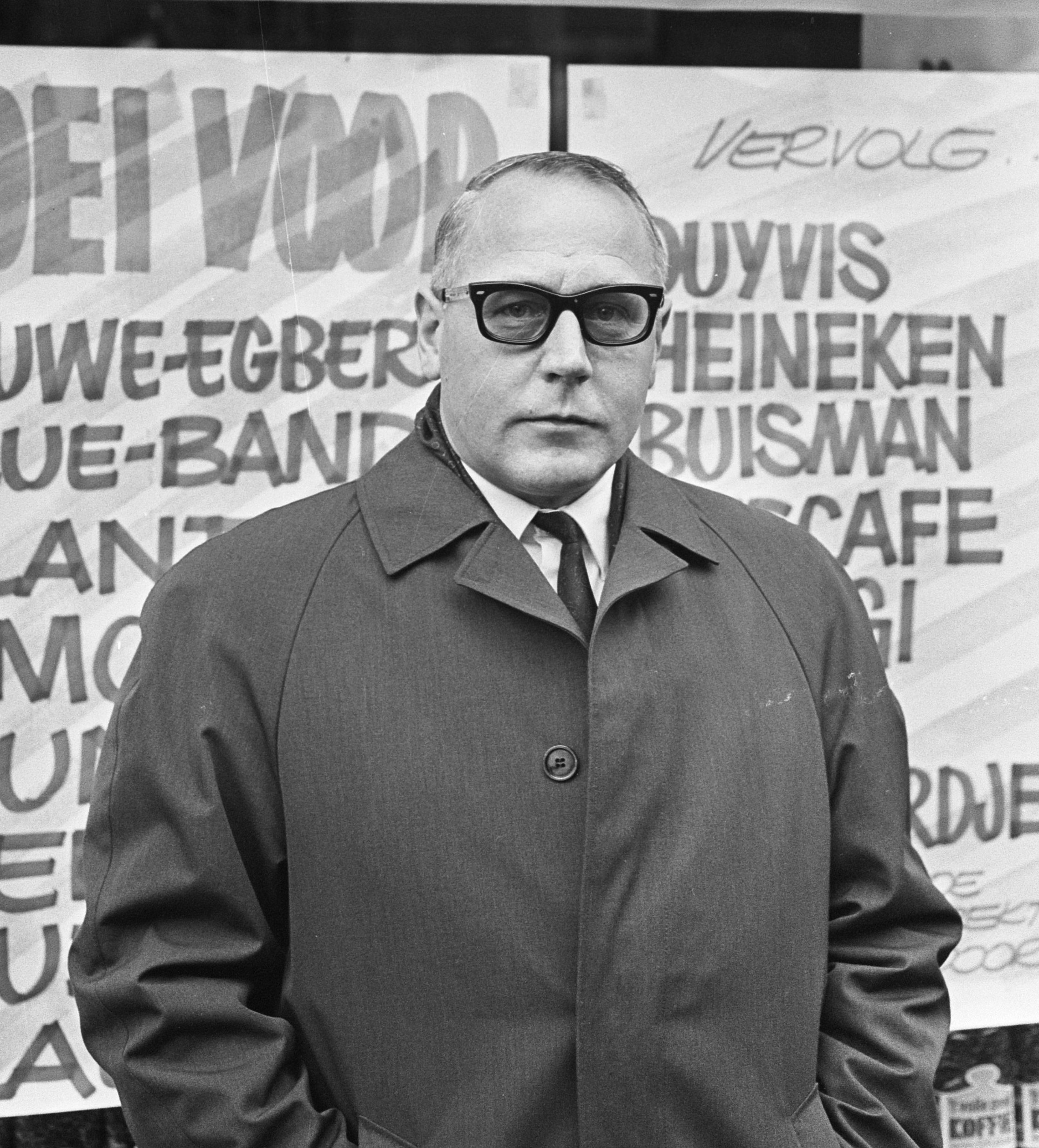 Collectie / Archief : Fotocollectie Anefo Reportage / Serie : [ onbekend ] Beschrijving : Dirk van den Broek (kop) en etalage Datum : 22 januari 1967 Fotograaf : Merk, Ben / Anefo Auteursrechthebbende : Nationaal Archief Materiaalsoort : Negatief (zwart/wit) Nummer archiefinventaris : bekijk toegang 2.24.01.05 Bestanddeelnummer : 920-0066